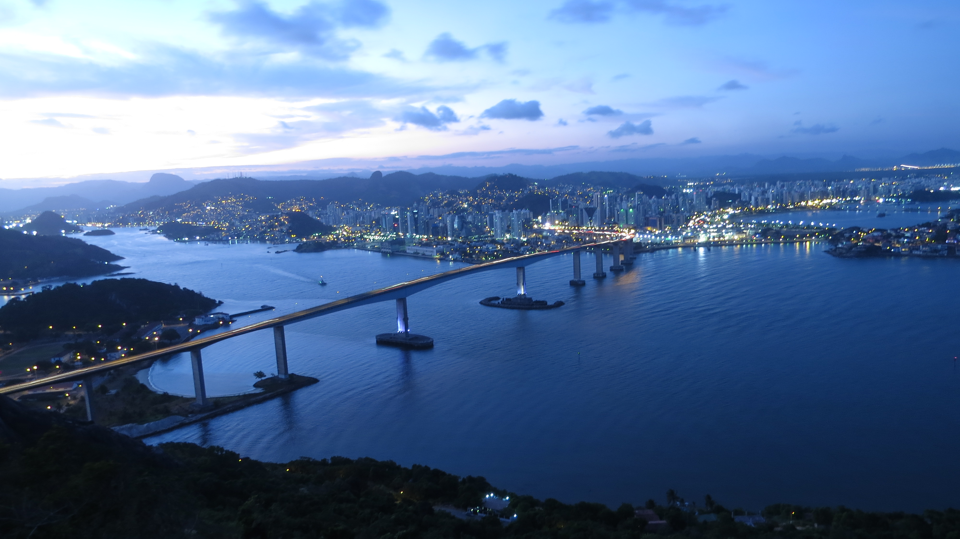 A belíssima baia de Vitória vista do morro do Moreno, no cair do dia